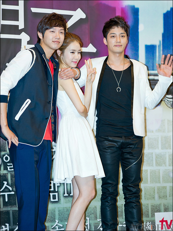 tvN 수목 드라마 인현왕후의 남자 제작 발표회에 참석한 지현우, 유인나, 김진우